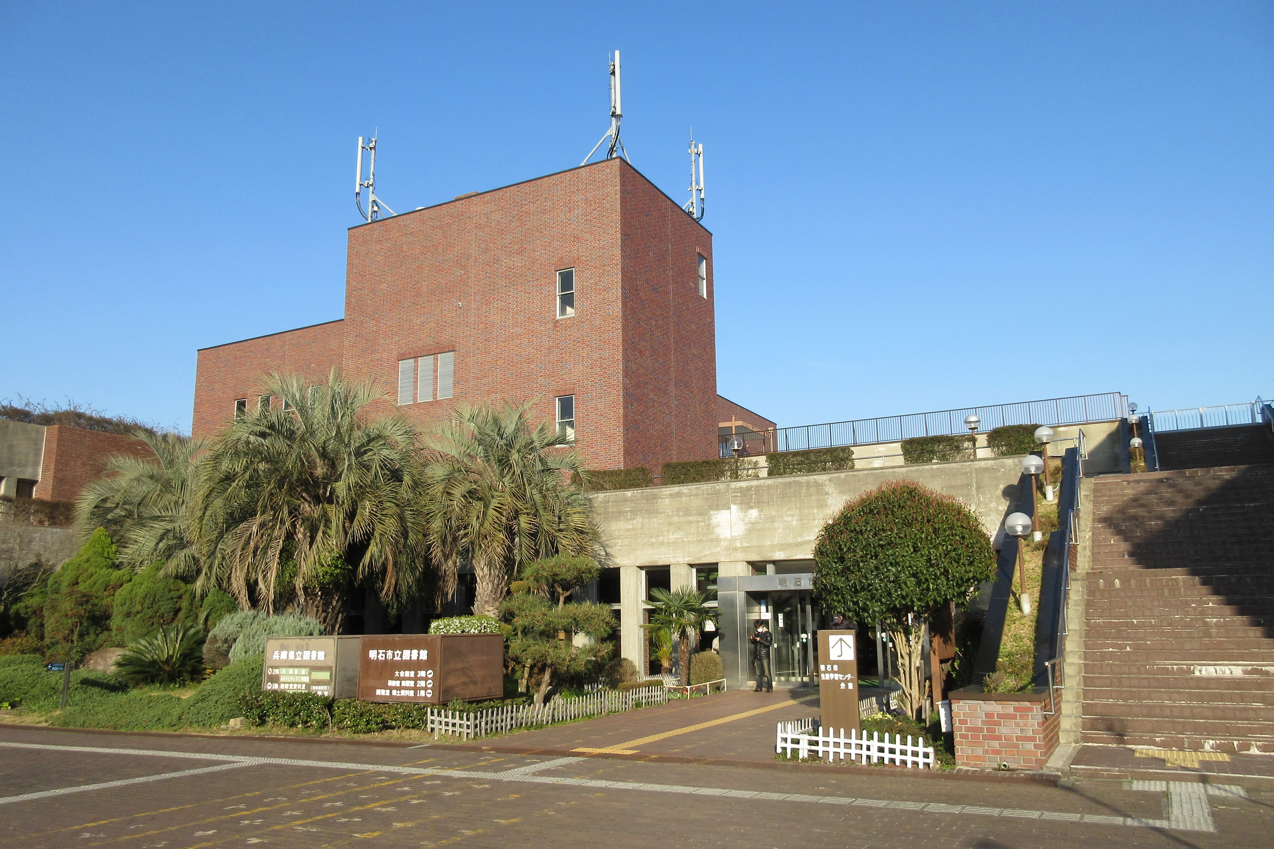 明石市立図書館